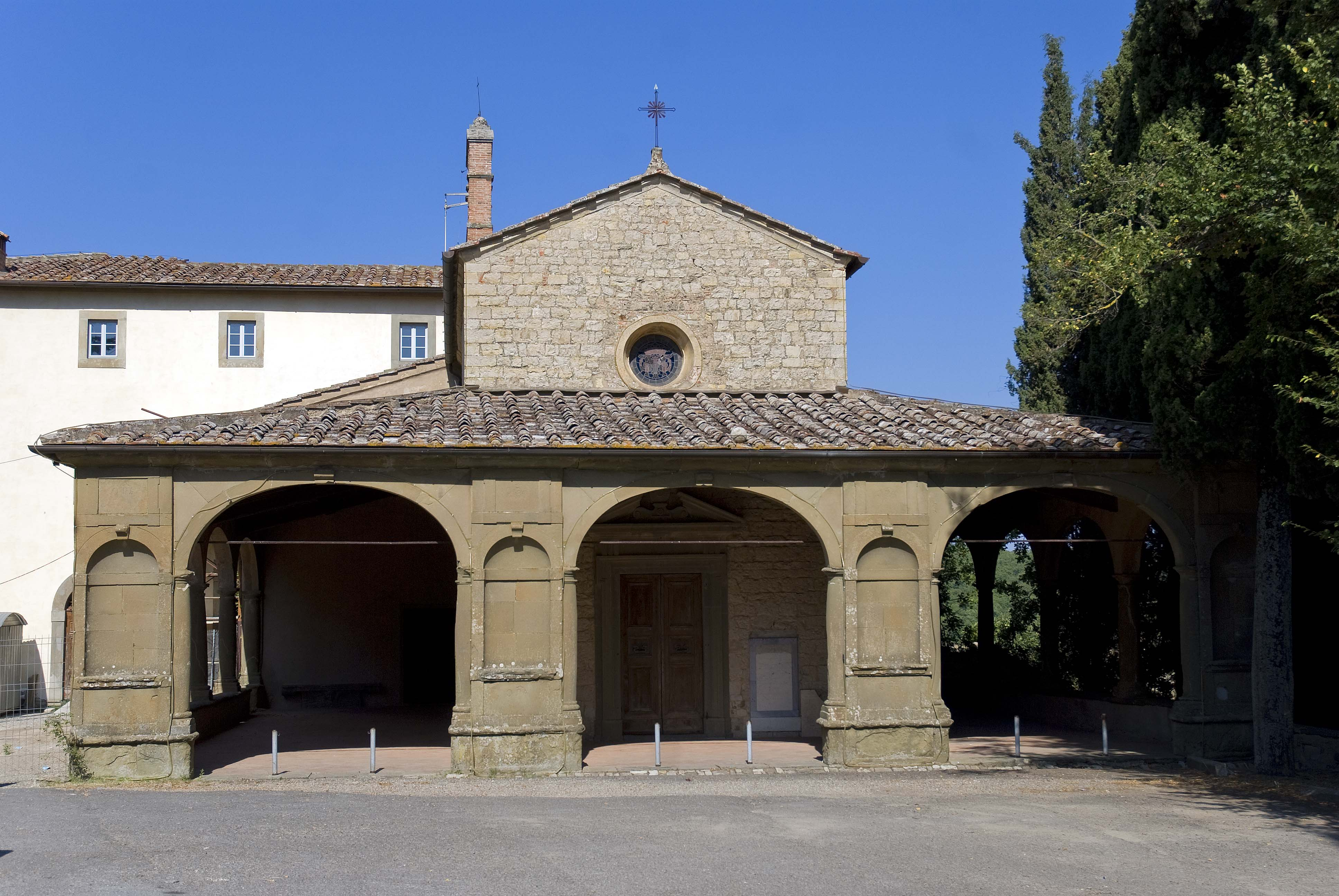 Chiesa di Santa Maria del Prato a Radda in Chianti